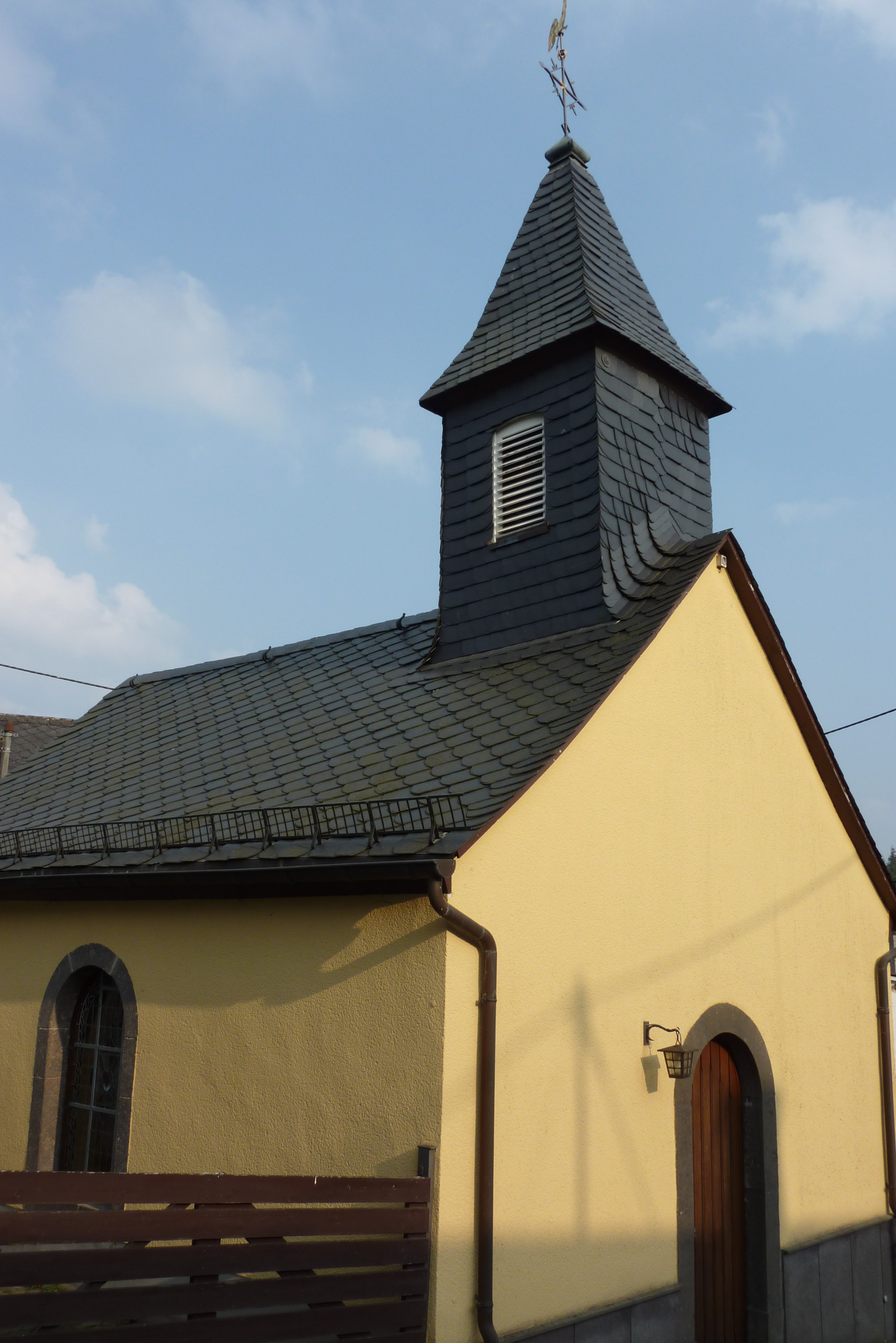 Kapelle zur Geburt Marias in Langscheid, Außenansicht